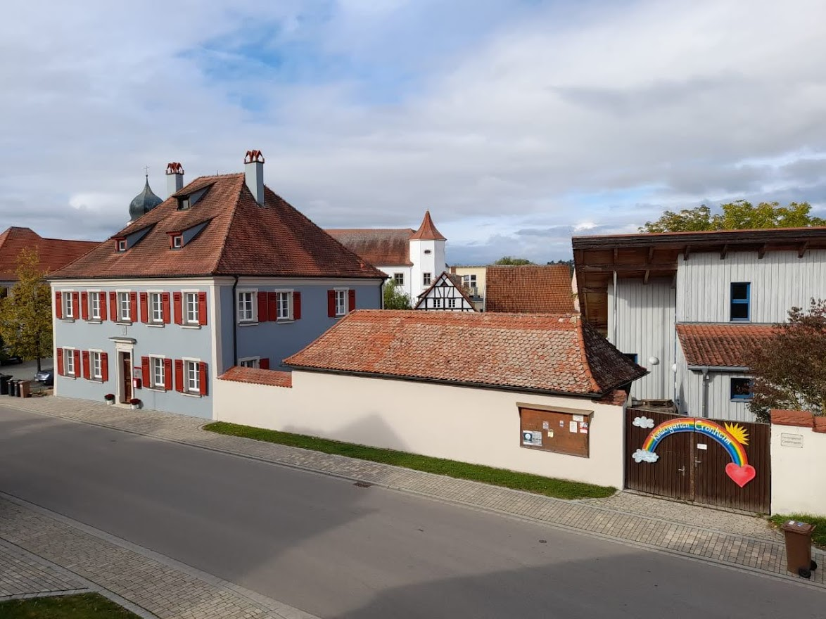 Historischer Pfarrhof Cronheim